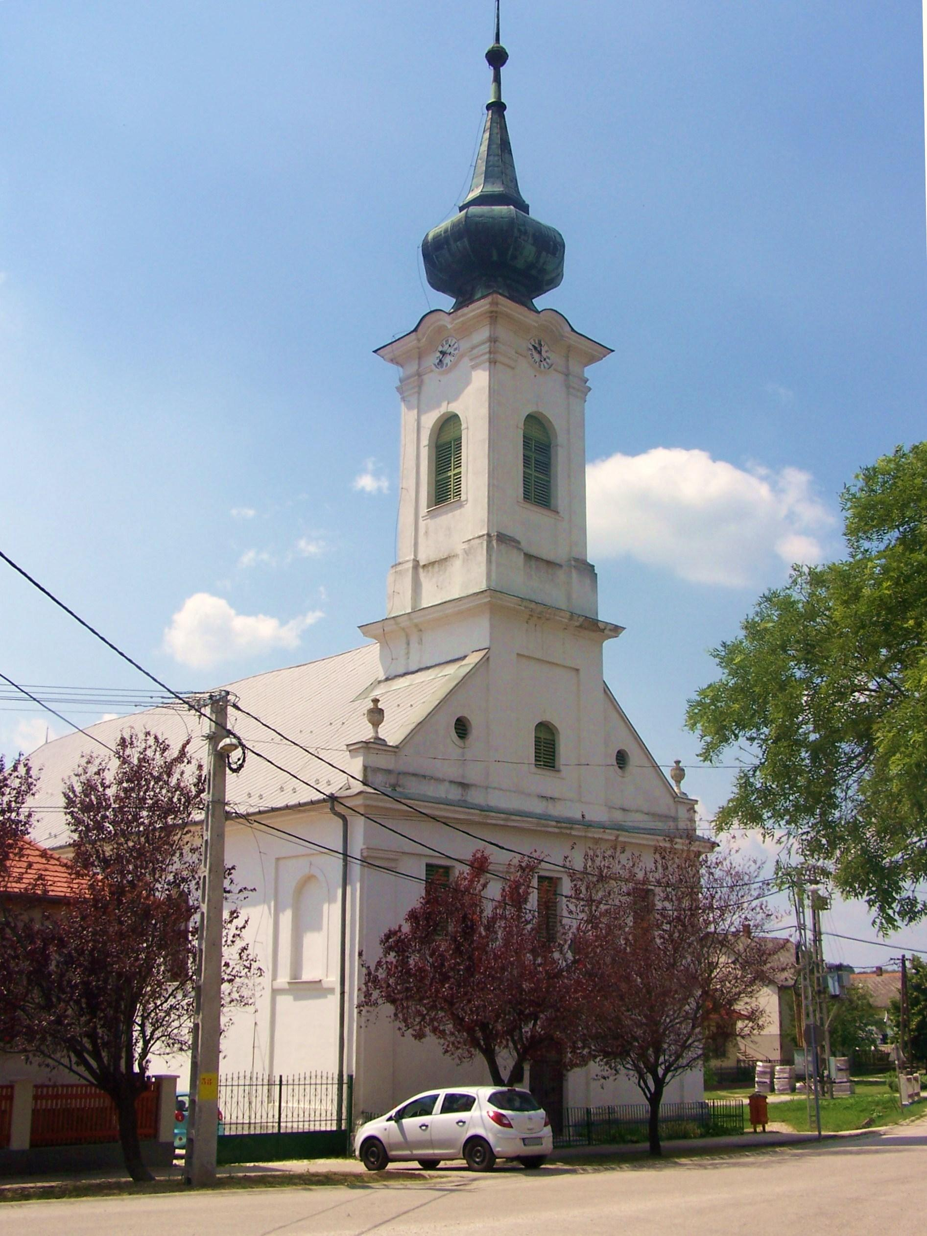 Ref. templom (Mány, Béke tér 7.) This is a photo of a monument in Hungary. Identifier: 3686